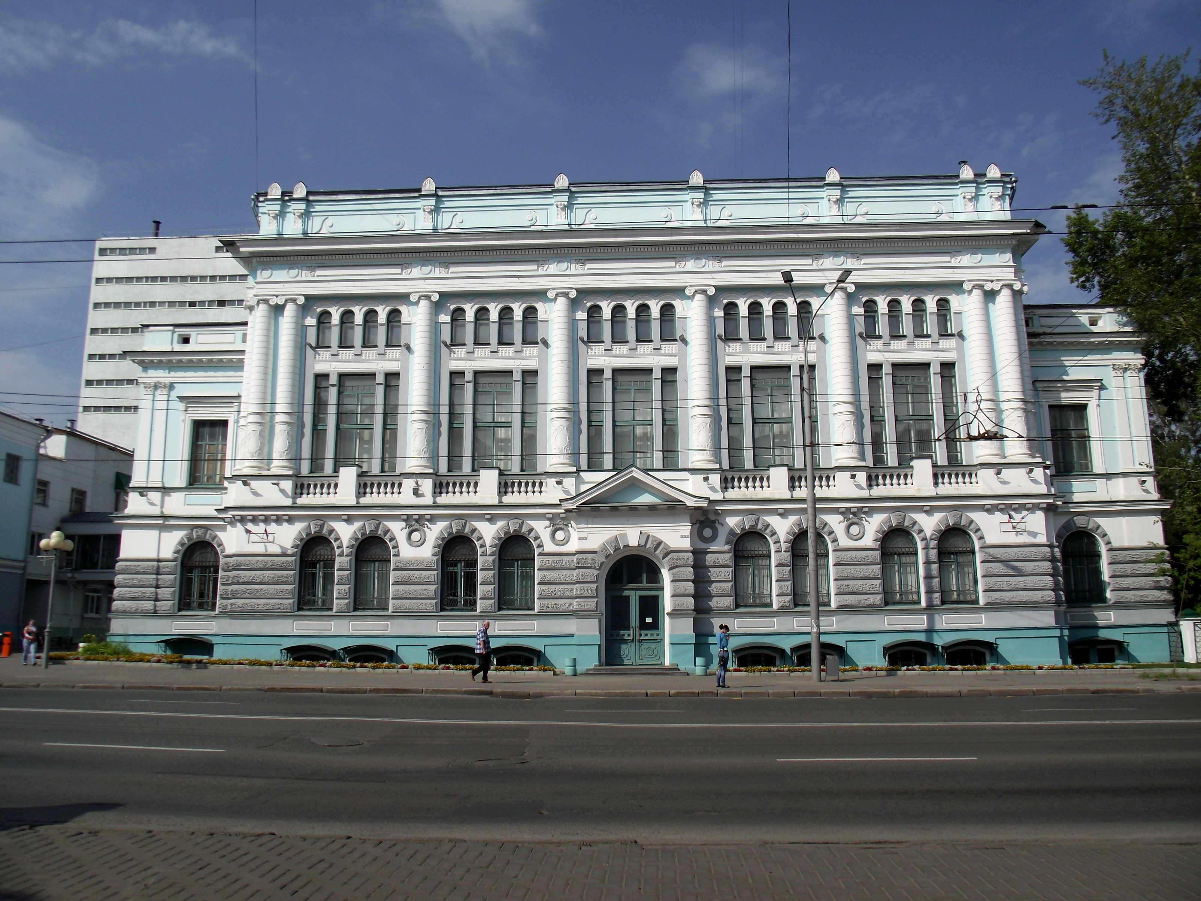 Вид с проспекта Ленина. Старое здание. Памятник архитектуры федерального значения.